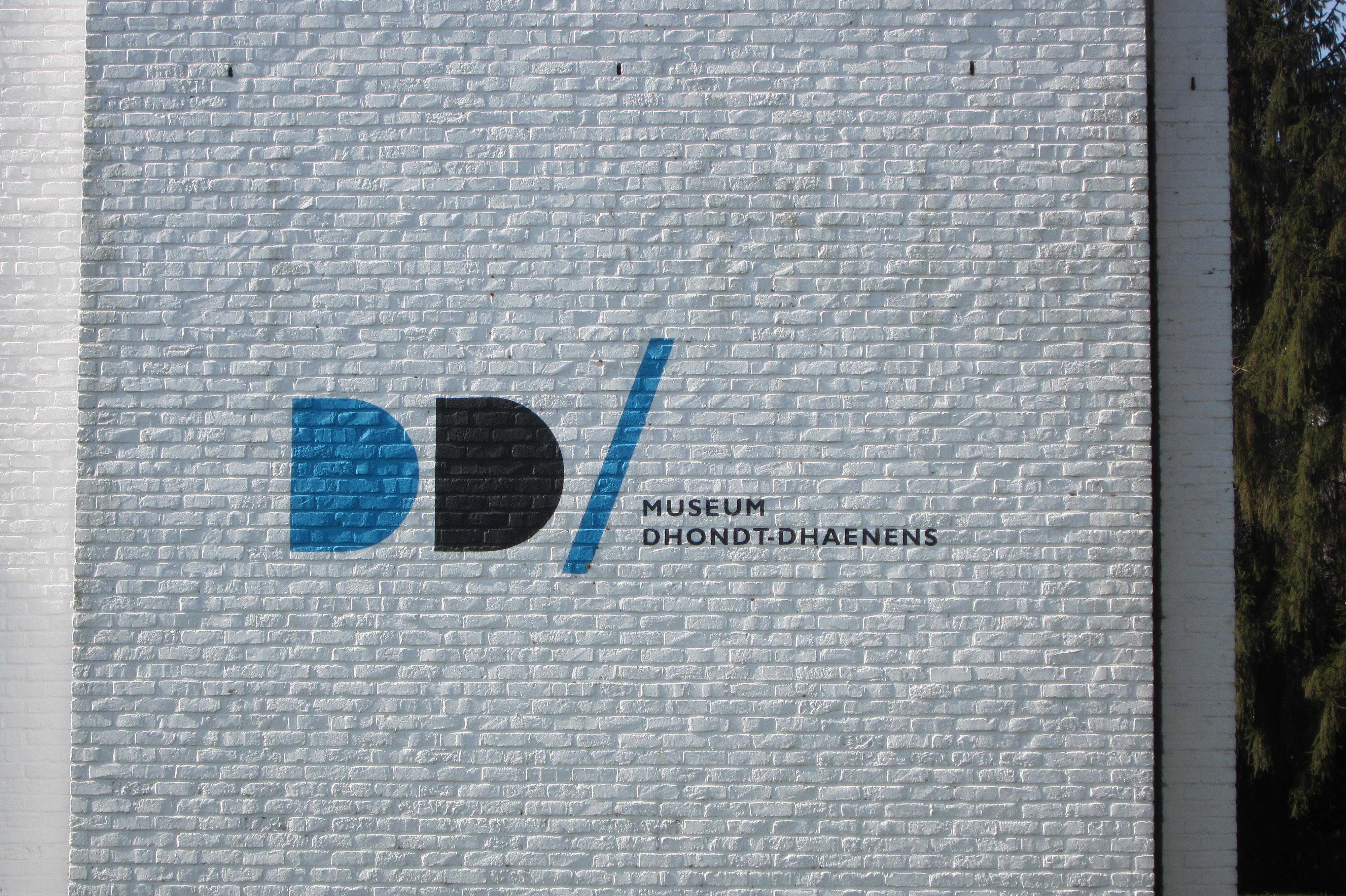 Logo Museum Dhondt-Dhaenens, Sing-Martens-Latem, België